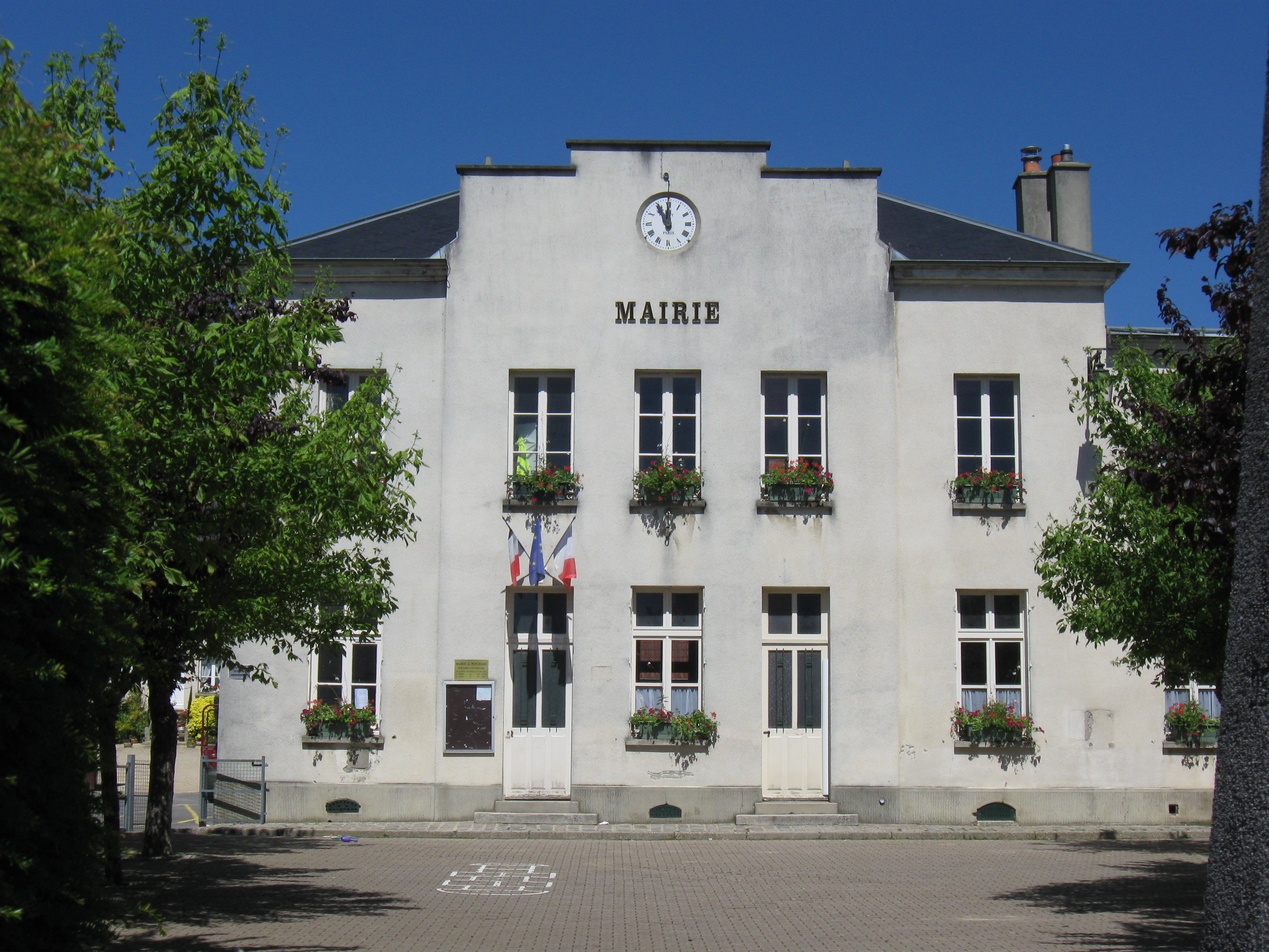 Mairie de Penchard. (Seine-et-Marne, région Île-de-France).